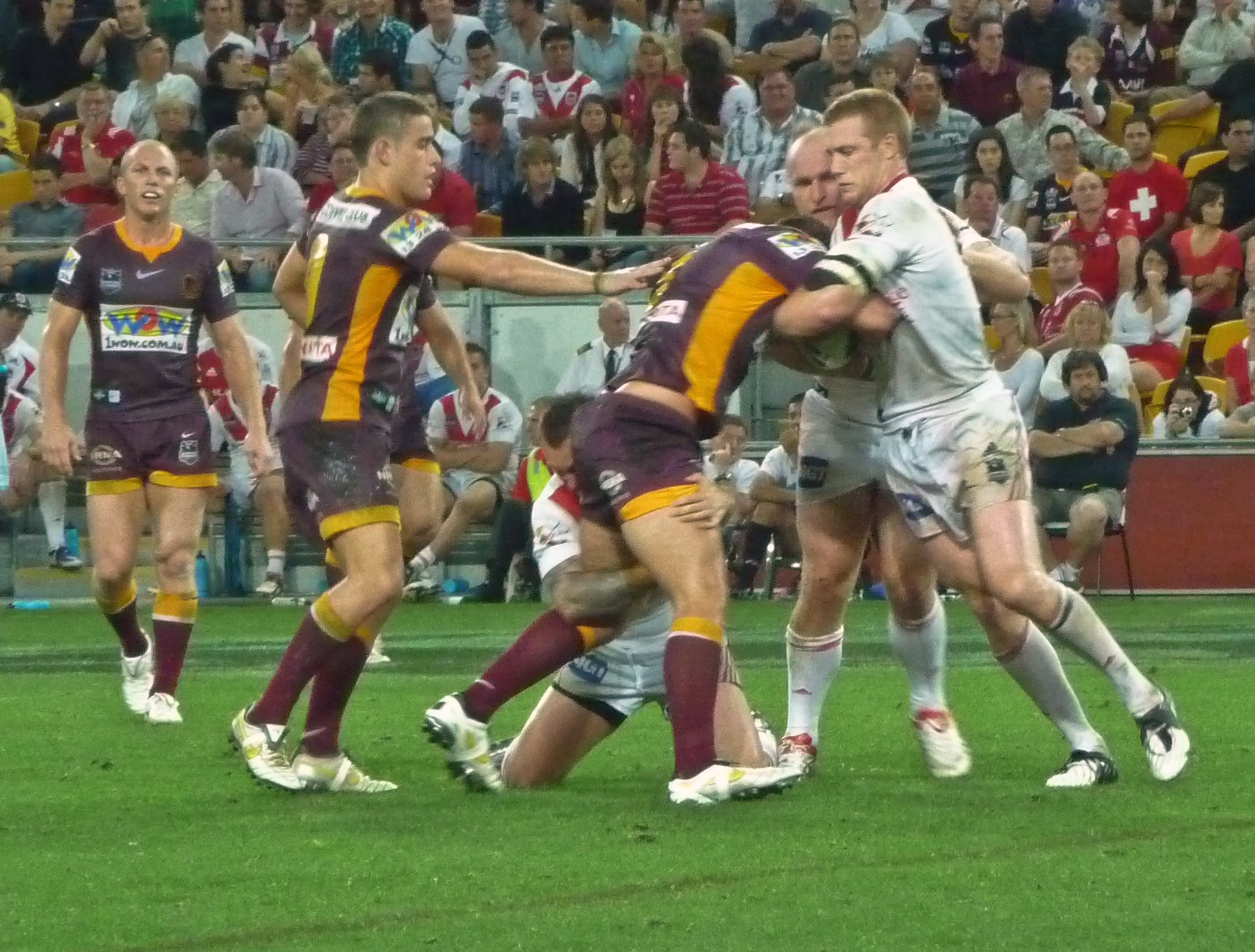 Broncos vs. Dragons 06